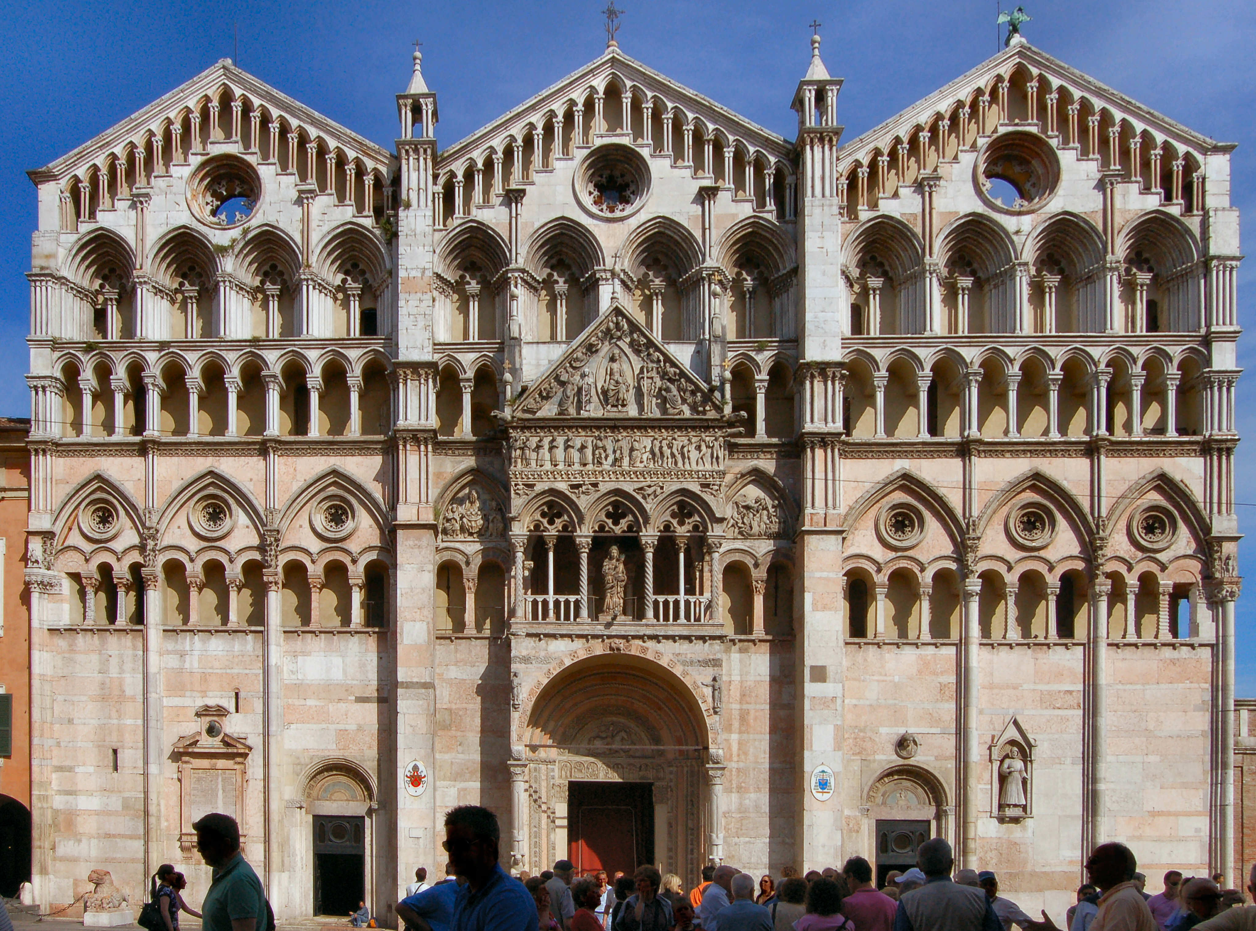 Cattedrale di San Giorgio a Ferrara, facciata.